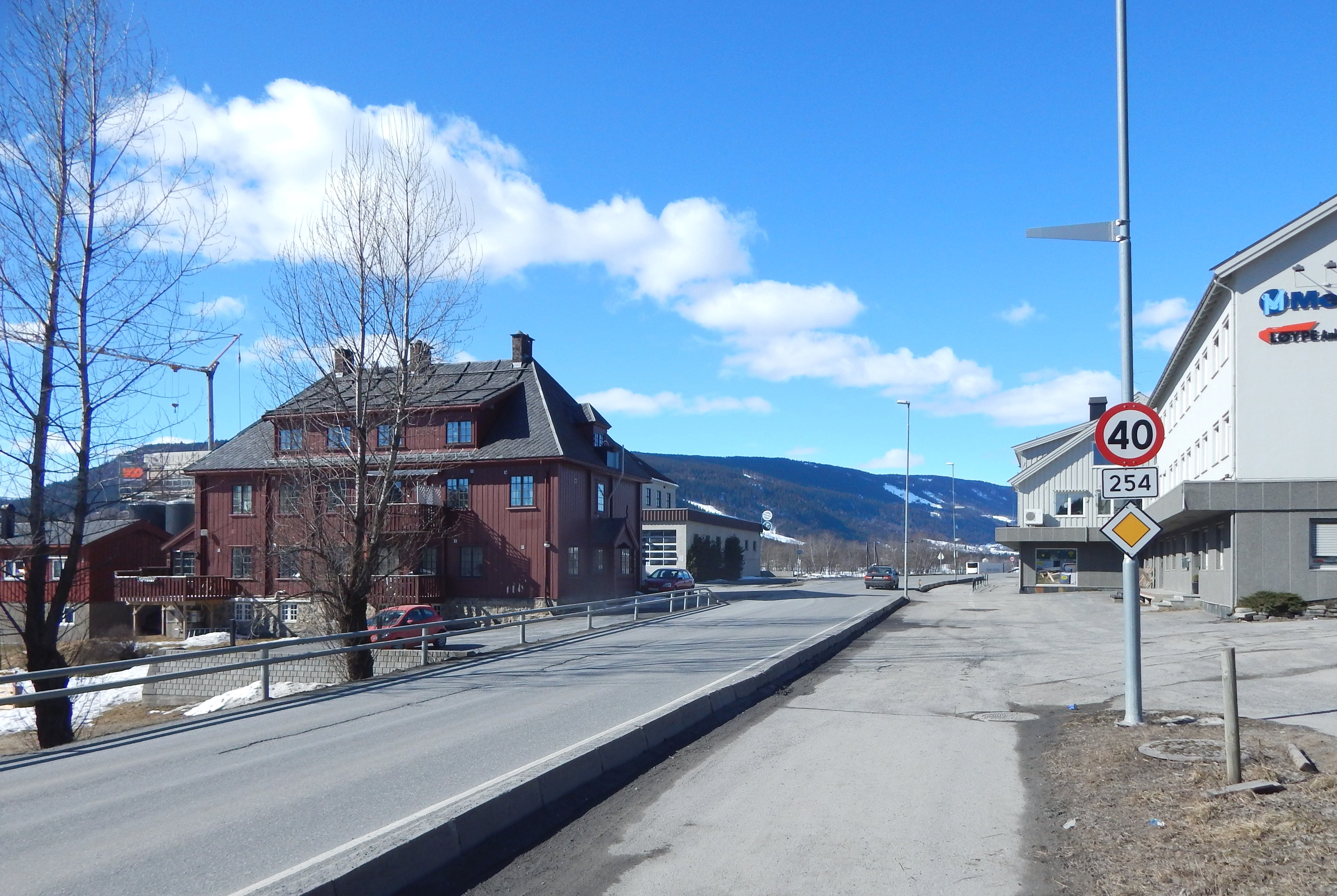 Fylkesvei 254 ved Segalstad bru